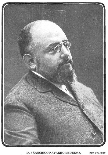 Retrato de Francisco Navarro Ledesma, fotografía de Christian Franzen recogida en la revista española Nuevo Mundo.